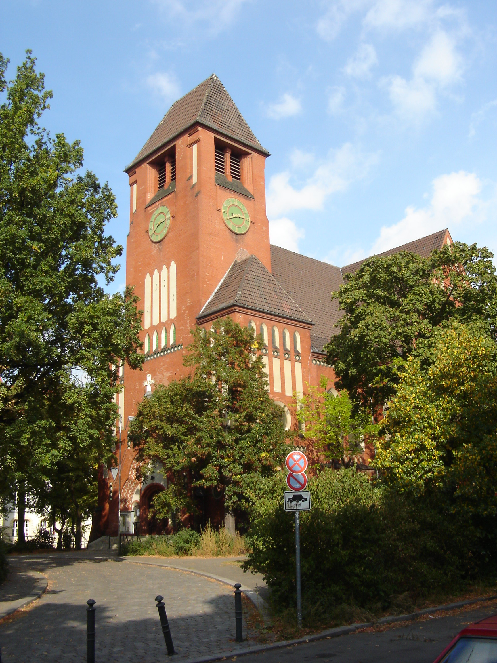 Nathanaelkirche, Grazer-Platz, Berlin-Schöneberg